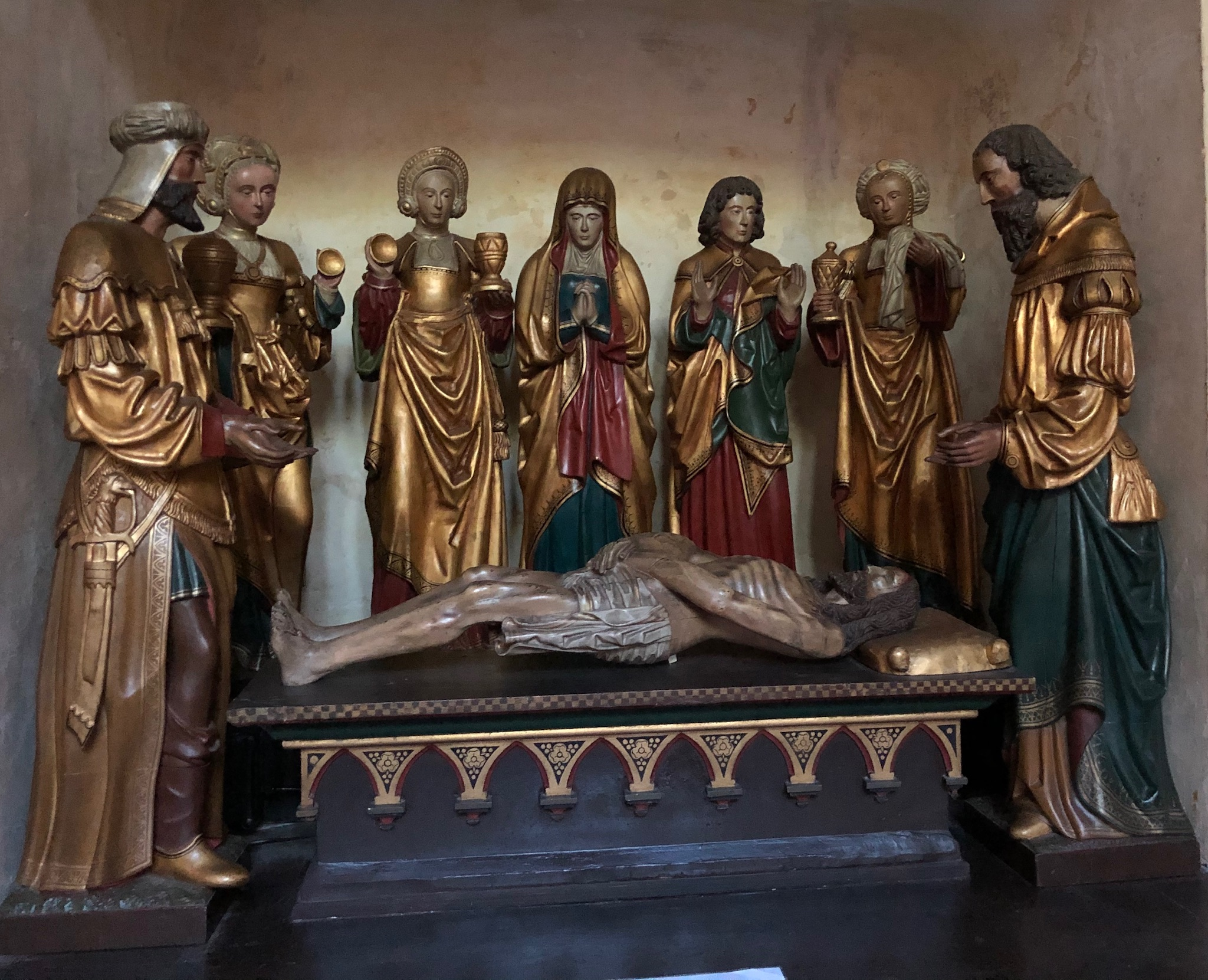 Grablegung Christi in Münsterkirche Roermond, Niederlande